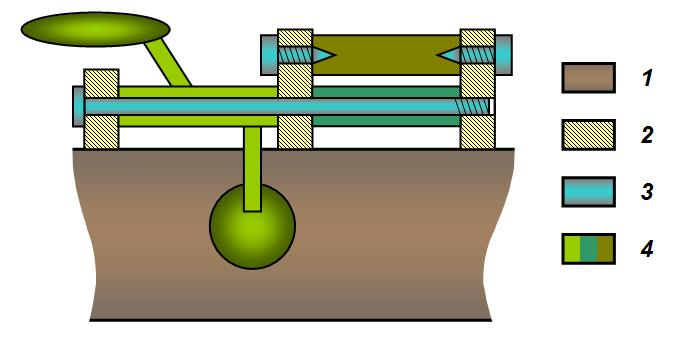 Schéma technologique de la liaison d'une clef d'instrument de musique: corps de l'instrument palier rapporté axe ou vis pointeau clefs (ici trois différentes) disposées coaxialement ou parallèlement. Celle de gauche est représentée entière avec la touche et le clapet. Schéma personnel réalisé sous word.